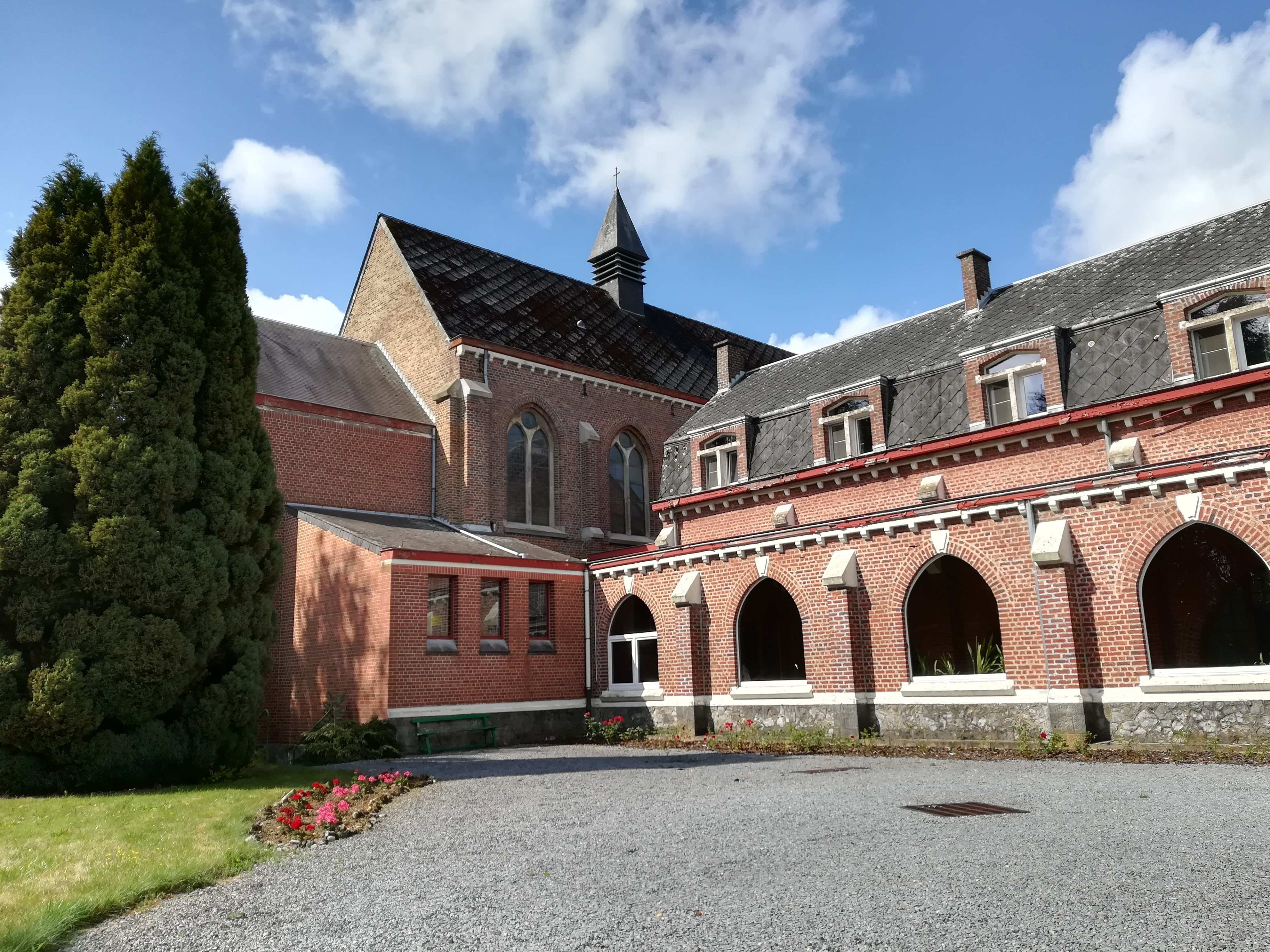 Hôtellerie